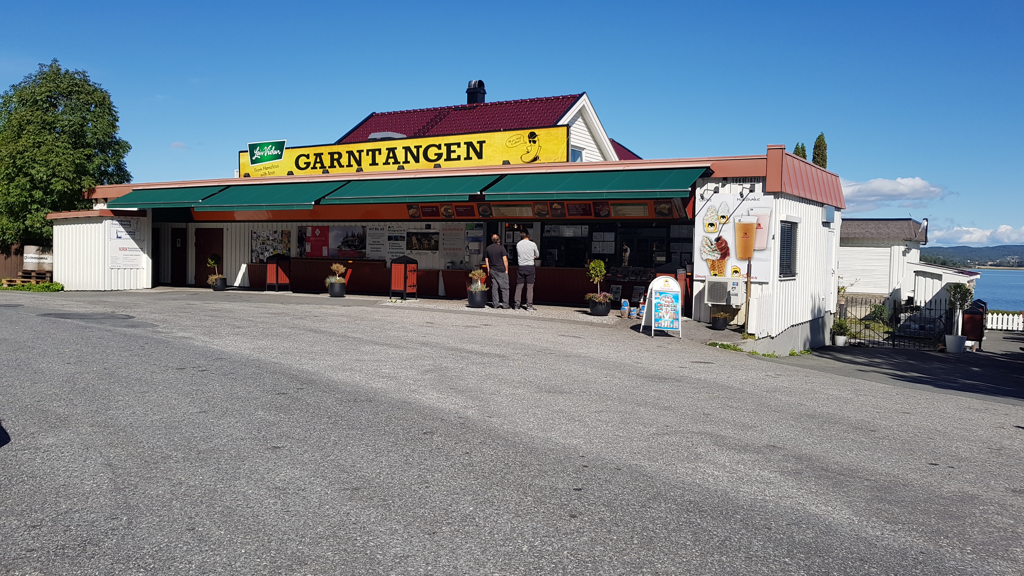 Garntangen gatekjøkken anno 2018. Stedet har sitteplasser ute og moderne sanitæranlegg.